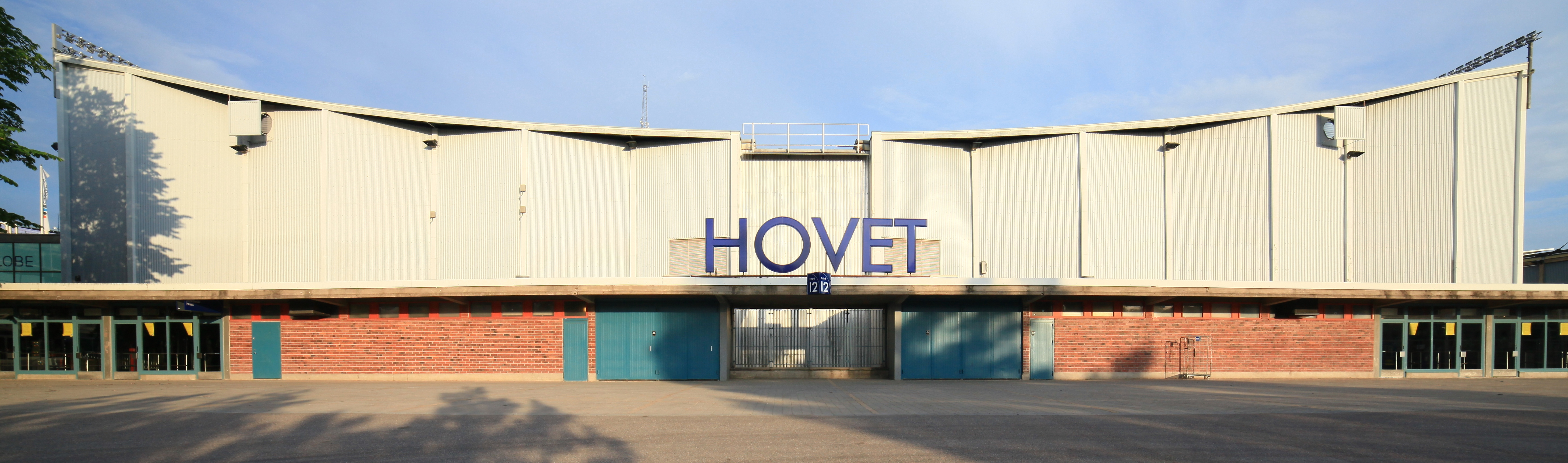 Hovet